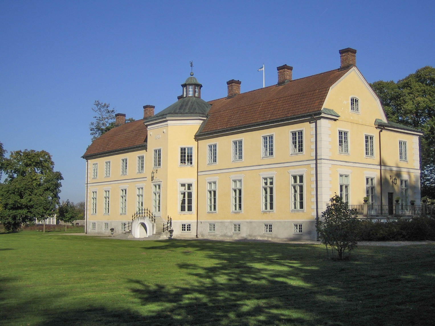 Löberöds slott. Bilden tagen av mig själv 7 oktober 2005.